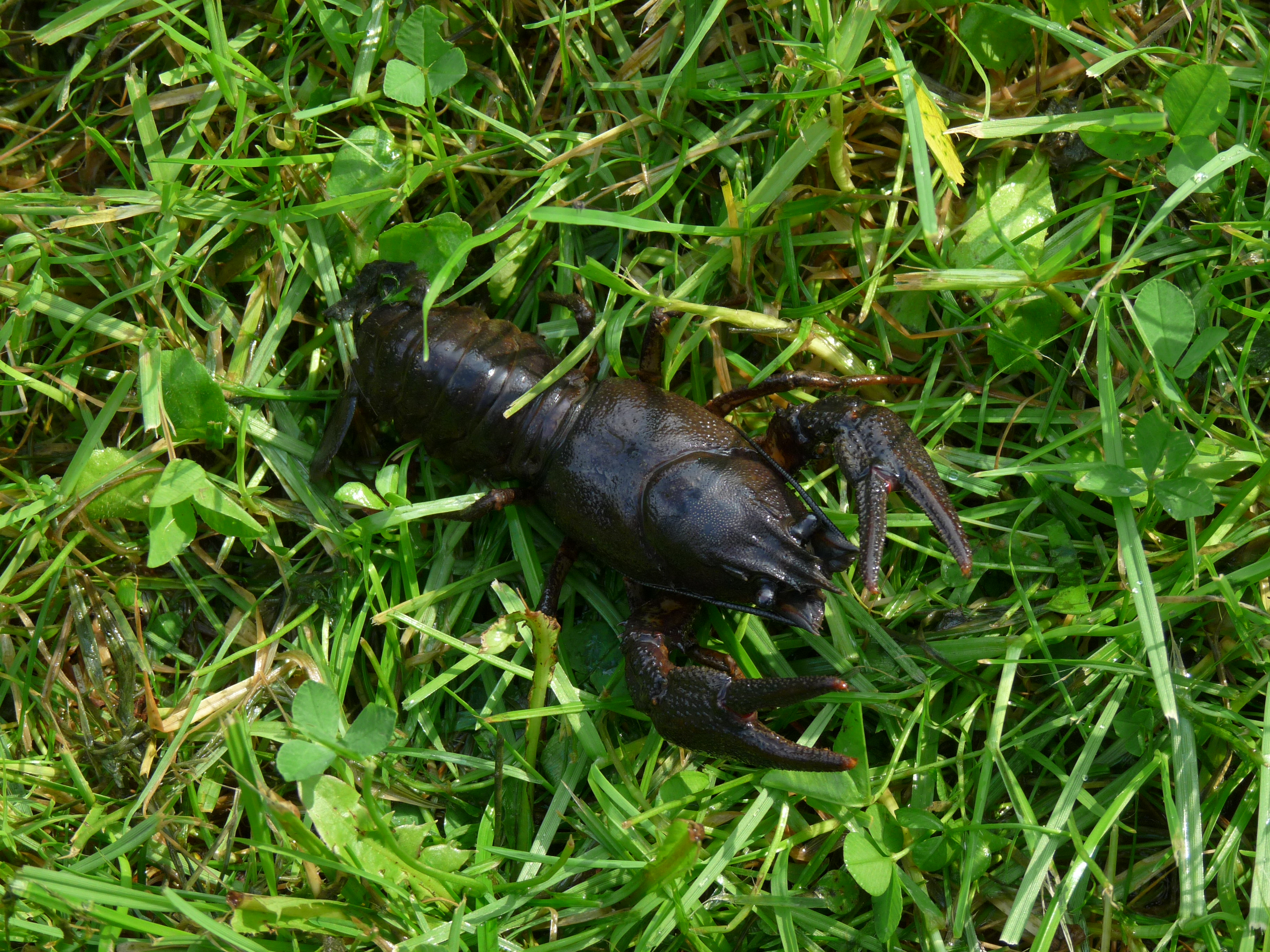 Der Krebs verlässt den Teich um in der Nähe in einen Bach zu gelangen.